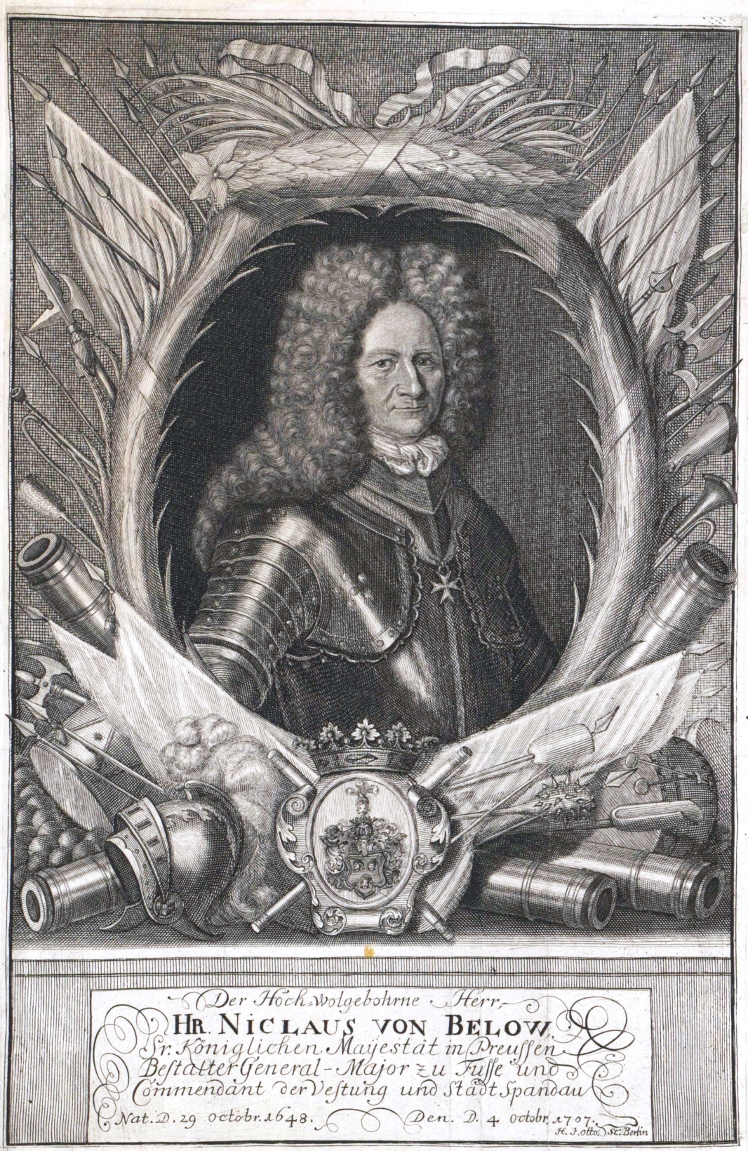 Below, Nicolaus von (Generalmajor, Kommandant der Festung und Stadt Spandau, 1648-1707)